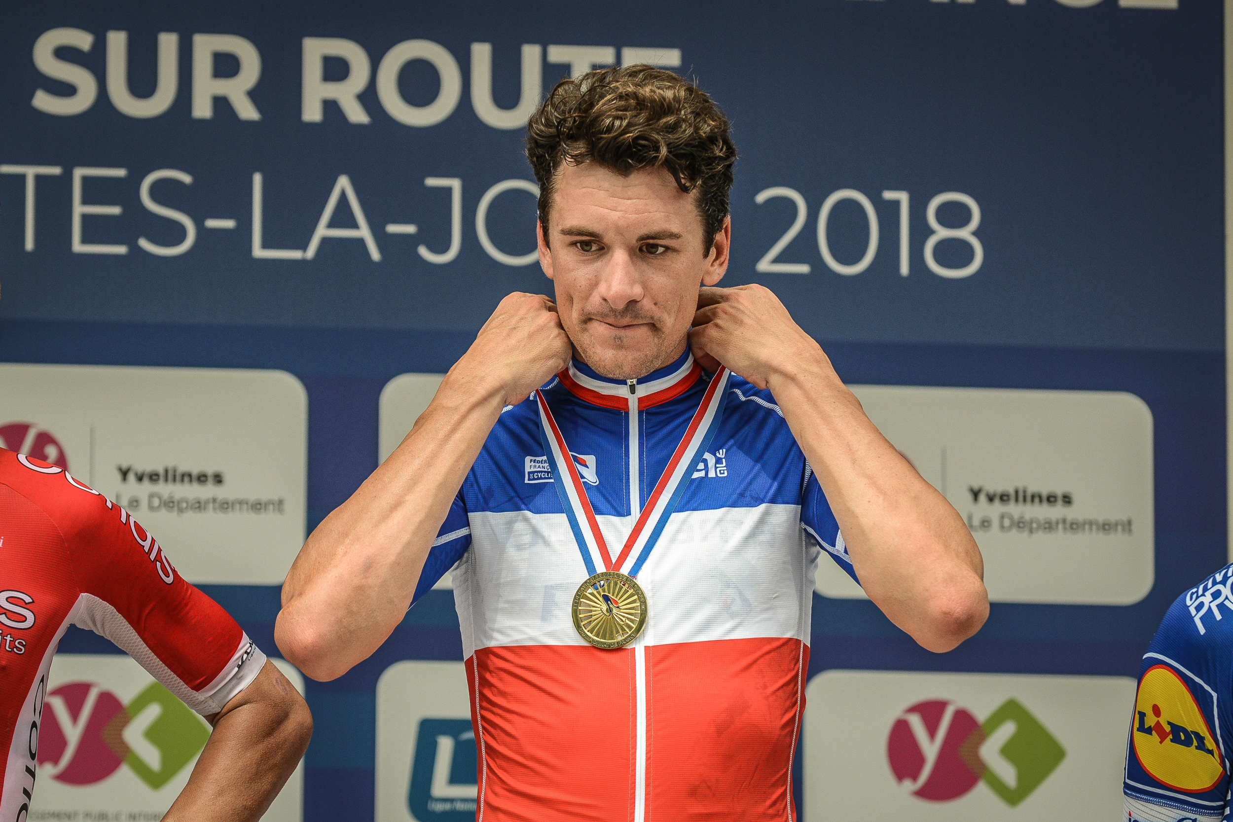 1er Juillet 2018 - Championnats de France - Course en ligne - Mantes La Jolie - Anthony Roux